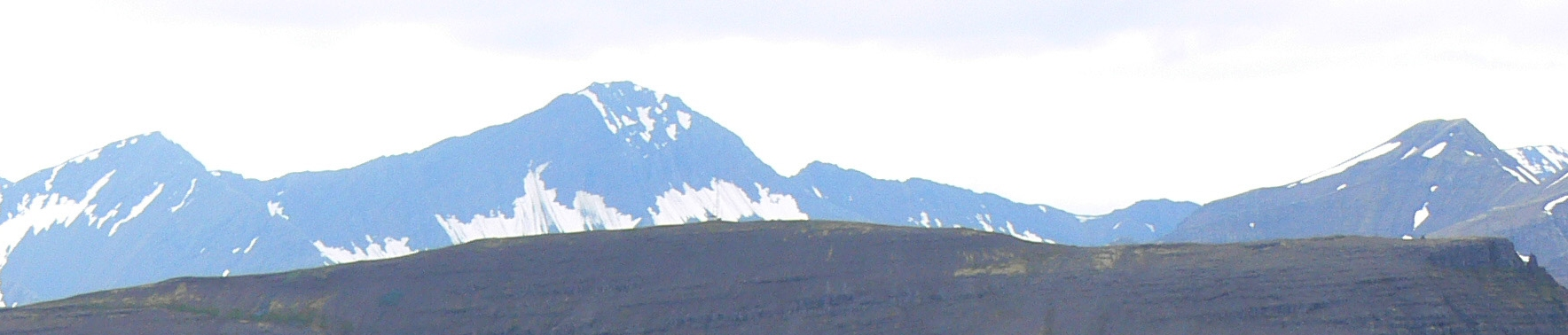 Þingeyri am Dýrafjörður von Gemlufallsdalur aus.